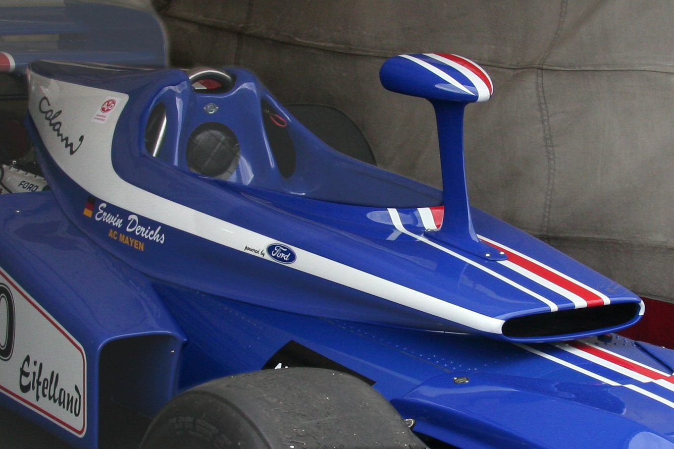 Cockpitverkleidung des Eifelland-March E21 von Luigi Colani, ausgestellt beim AvD-Oldtimer-Grand-Prix